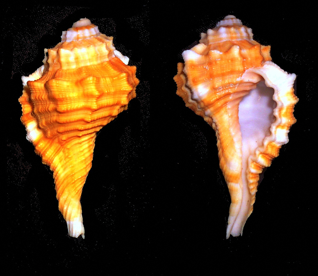 Ranularia sarcostoma (synonym : Cymatium (Ranularia) sarcostomum)